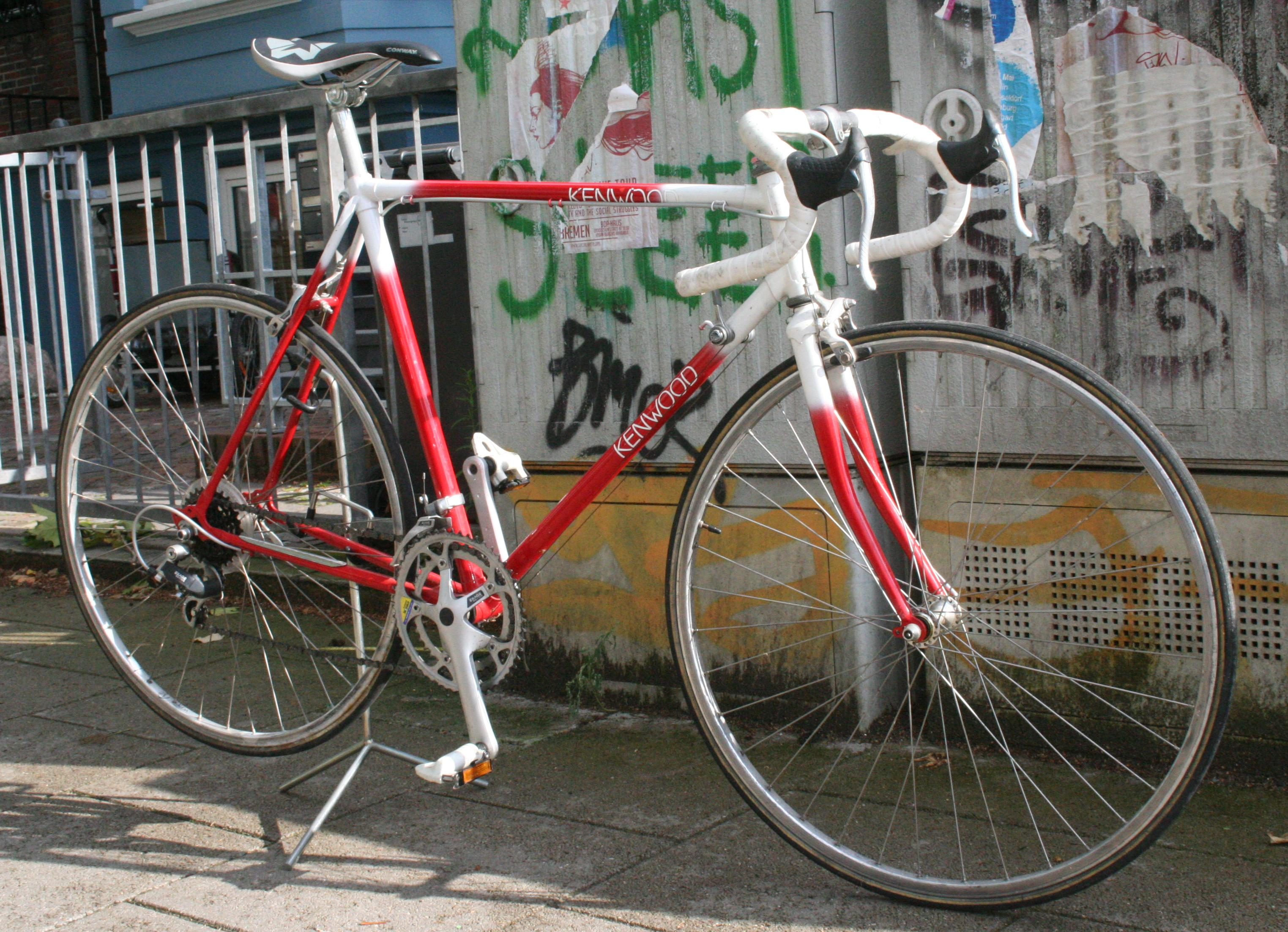 Kenwood road bike